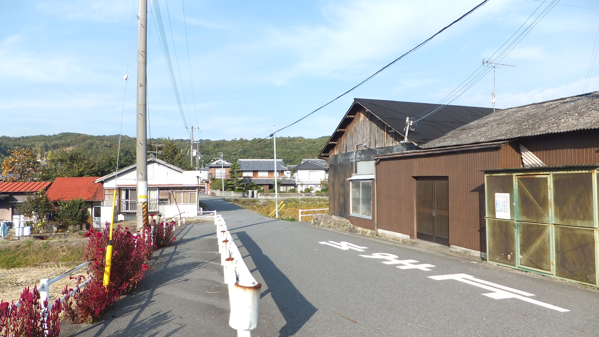 兵庫県三木市志染町安福田